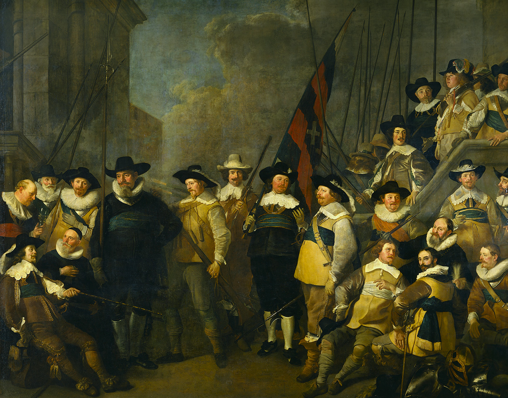 Officers and other members of the militia of district V in Amsterdam lead by Captain Cornelis de Graeff and Lieutenant Hendrick Lauwrensz. The people portrayed are: Cornelis de Graeff, Hendrick Lauwrensz, Joachim Jansz Scheepmaker (cornet), Teunis Jansen Visch & Jan Gerritsz van Leeuwaerden (sergeants), Marten Canter, Hans van der Elst, Warnar Wiggertzen, Adam Gerritzen, Hendrick Janzen, Hendrick Rijckzen, Elias de Haes, Cornelis Cornelissen Karseboom, Barent van Bruyninckwinckel, Willem Janzen van Middelum, hendrick Pauwels, Jan Gerritzen Parys, Gerrit Brauningh Koeckebacker, Hendrick Aertzen de Keyzer, Jan Jacobsz Lantsman, Willem Janzen Buys, Jan Evertzen van Heerden, Jan Evertzen Mattys